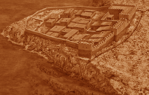 Mapa de la ciudadela iberica de Calafell, Tarragona, Catalunya.